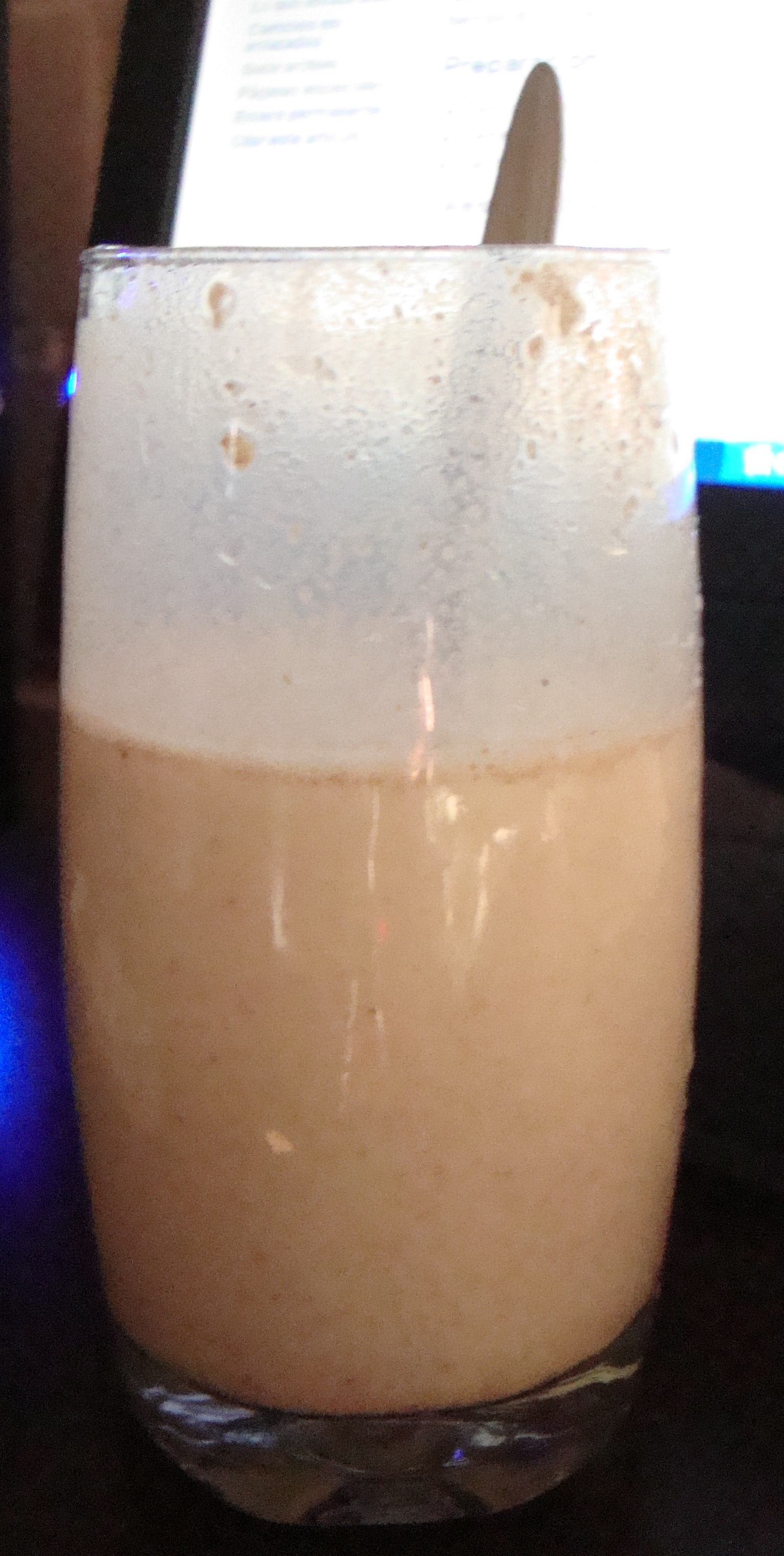 Imagen del Ulpo, bebida Chilena hecha de Harina tostada y diferentes tipos de líquidos (Leche, bebidas gaseosas, etc.)